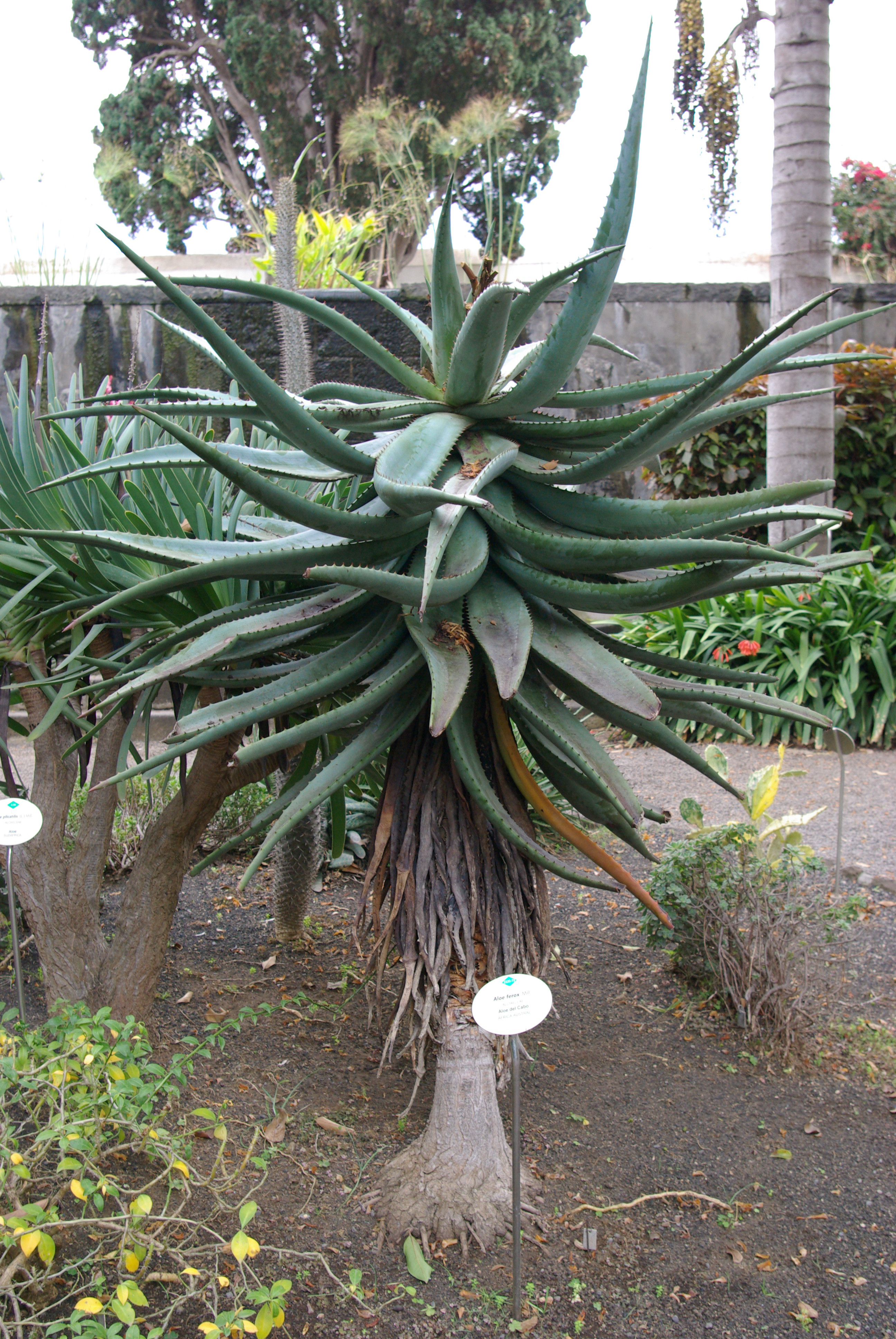 Aloe ferox im Botanischen Garten von Puerto de la Cruz, Teneriffa